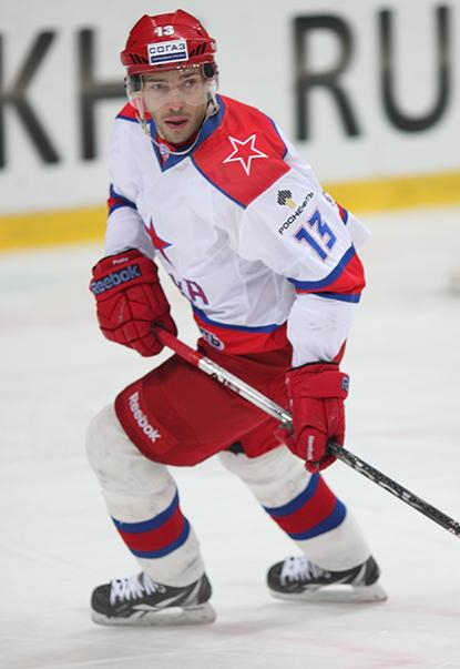 Нападающий ЦСКА Павел Дацюк во время матча чемпионата КХЛ против новокузнецкого «Металлурга» 28 ноября 2012 года.